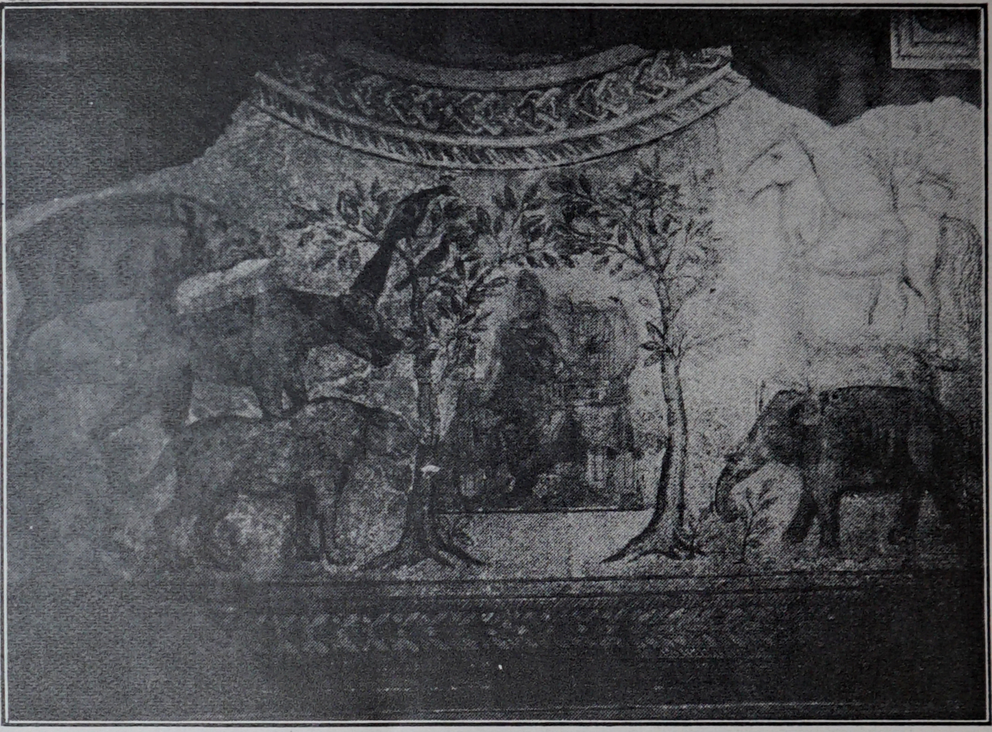 trouvé en 1854, publié en "almanach Matot-Braine 1915-17".